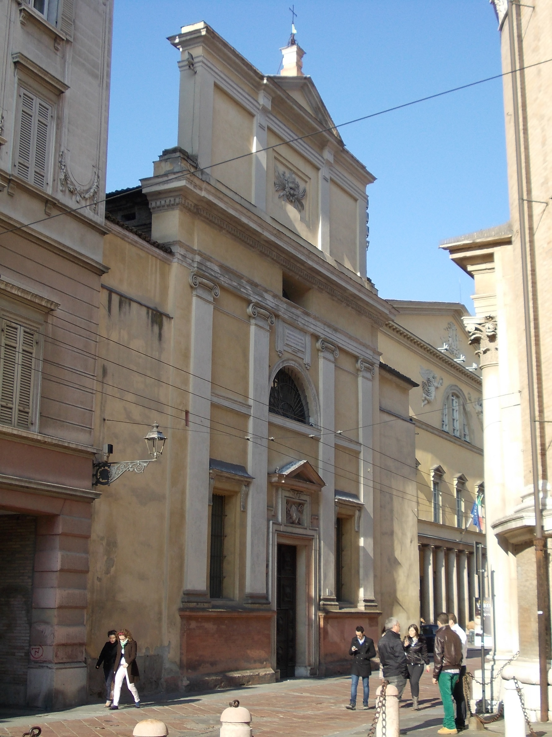 La chiesa di Sant'Alessandro a Parma